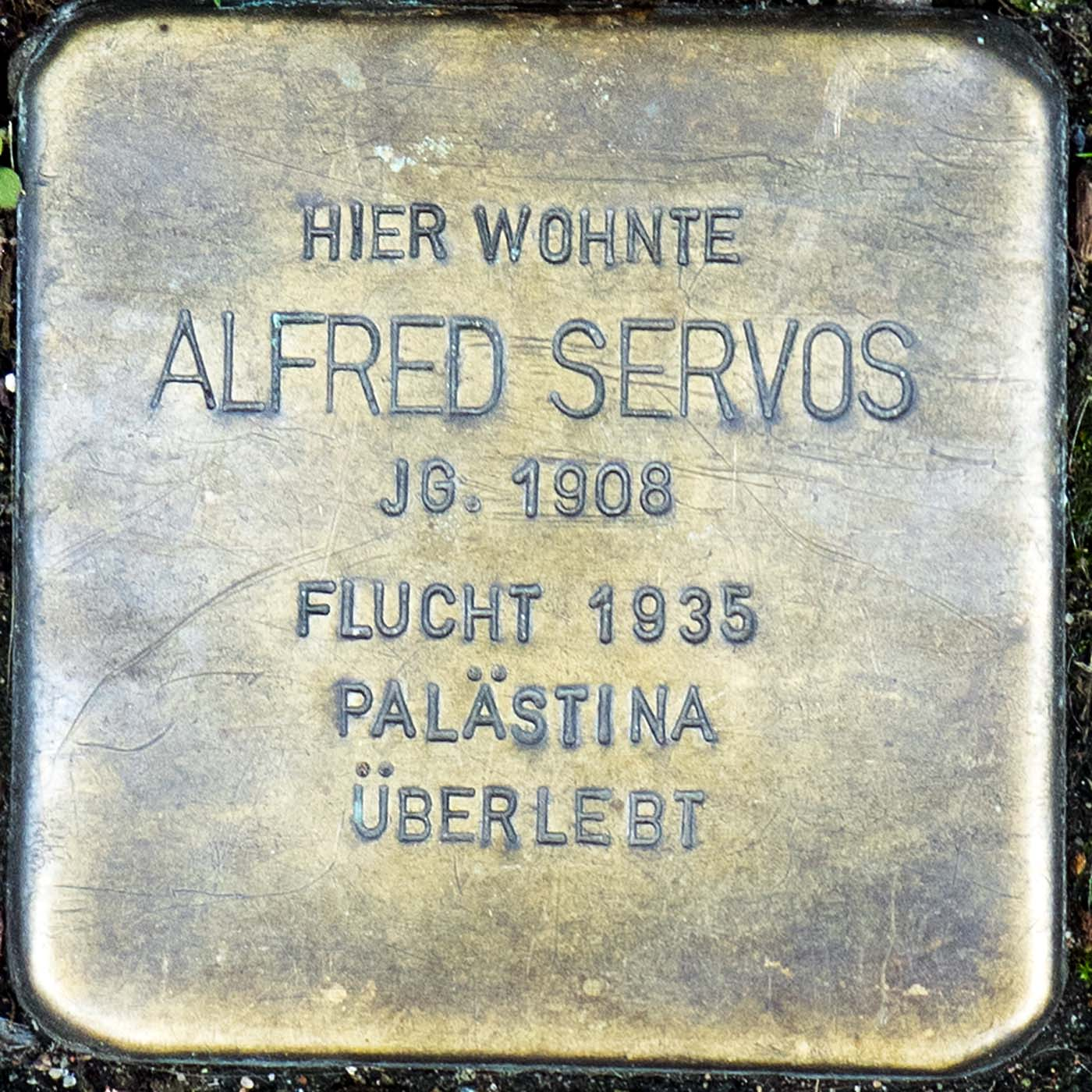 Stolperstein für Alfred Servos (Willich)